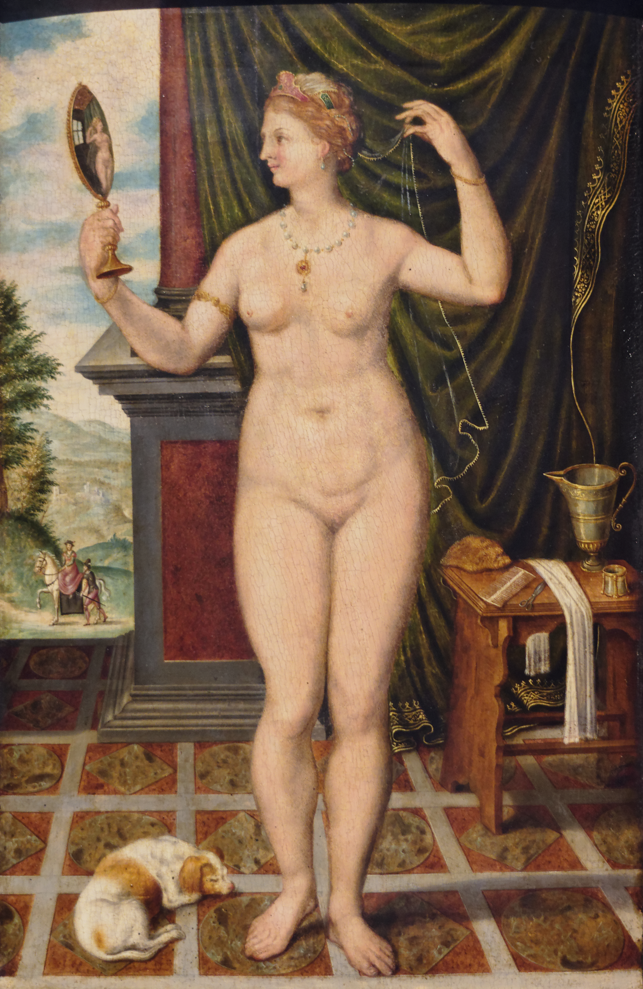 Vénus au miroir. Huile sur bois (54 X 34 cm). Anomyme, École de Fontainebleau. - Musée Ursulines Mâcon. Inv A 700. Legs Havard 1923